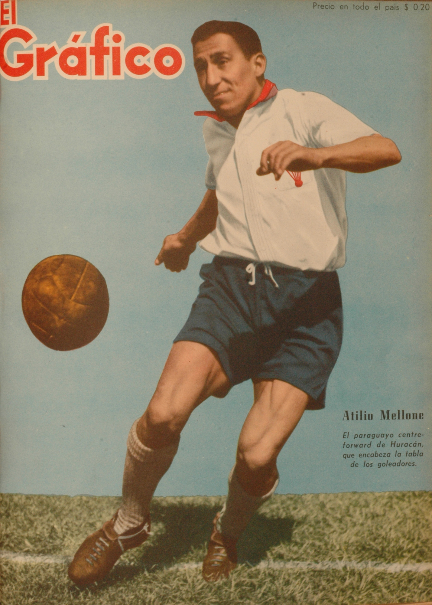 El Grafico del 06 de Octubre de 1944. Edicion 1317